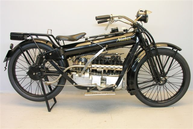 Nimbus 750 cc uit 1922, bijgenaamd "Kachelpijp".